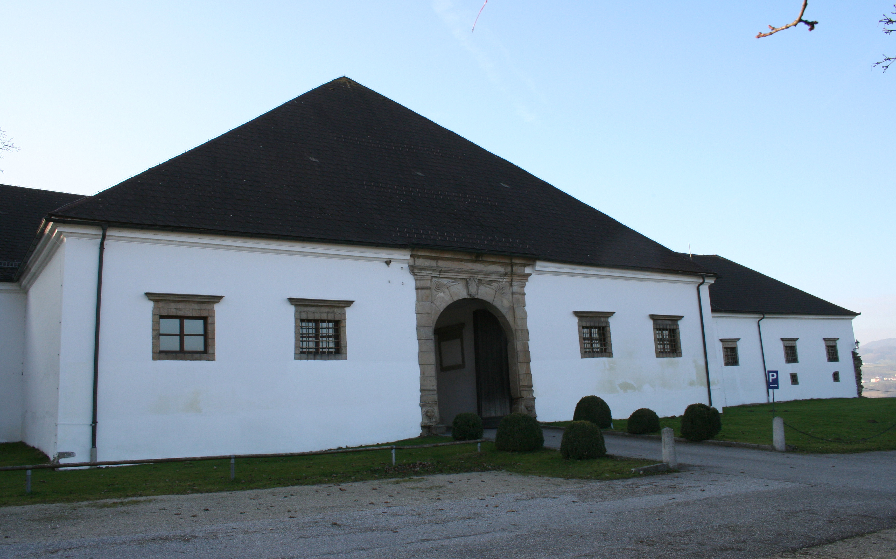 Schloss Neu-Luftenberg, ehemaliger Meierhof Ostseite, Eingangsbereich